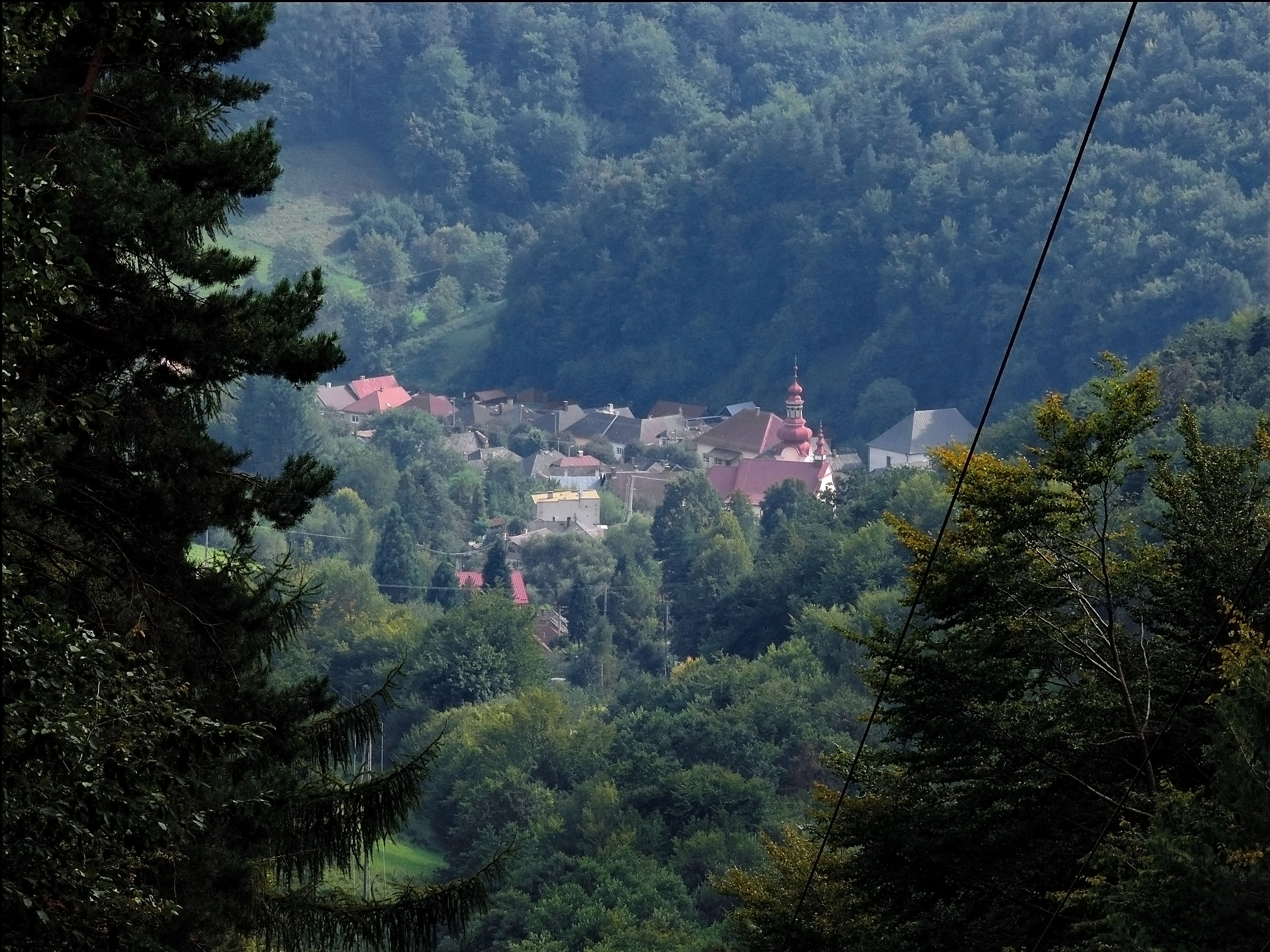 Pohľad na Štós